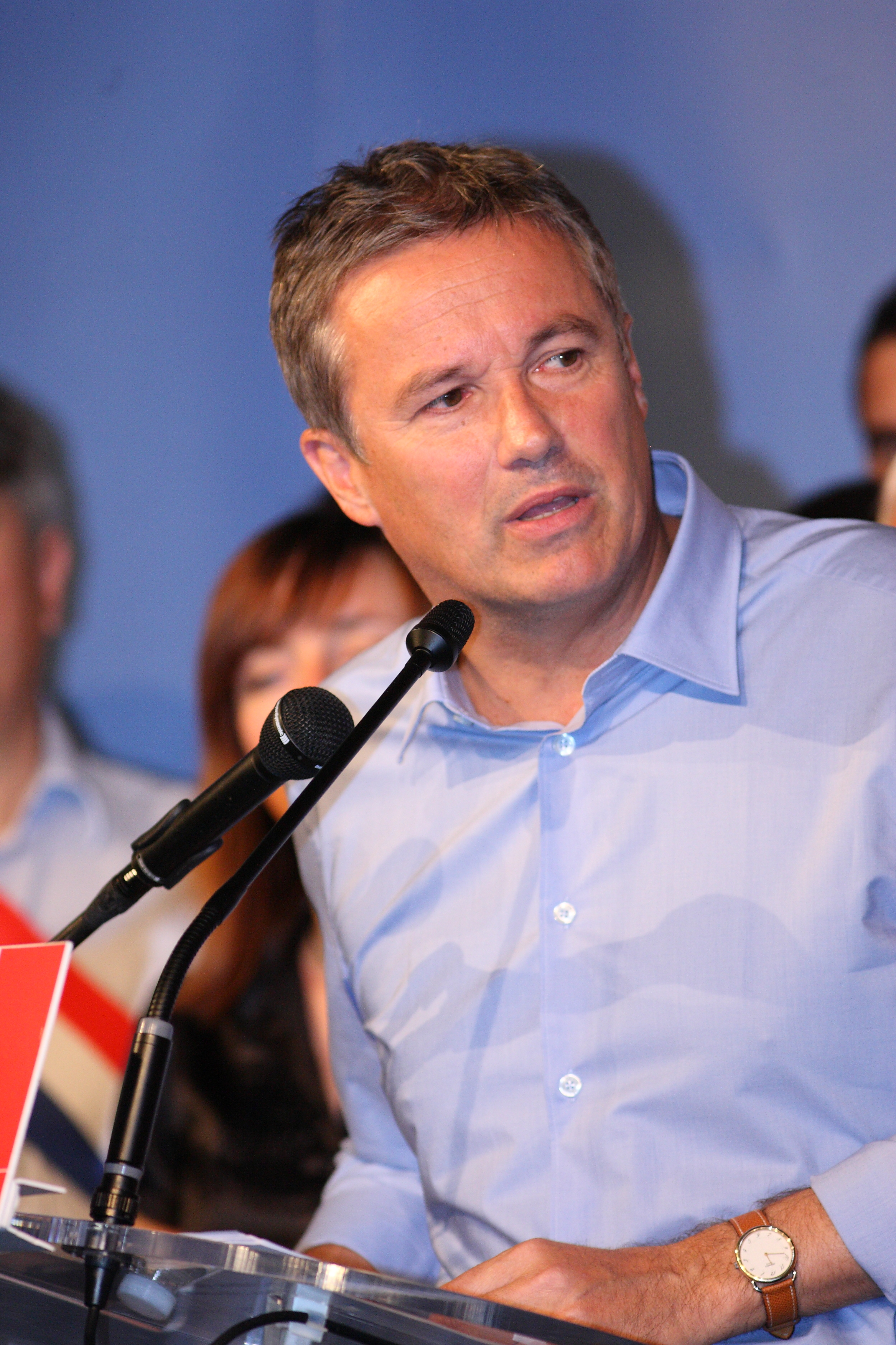 Nicolas Dupont-Aignan lors du discours de cloture des Universités de rentrée DLR de 2011